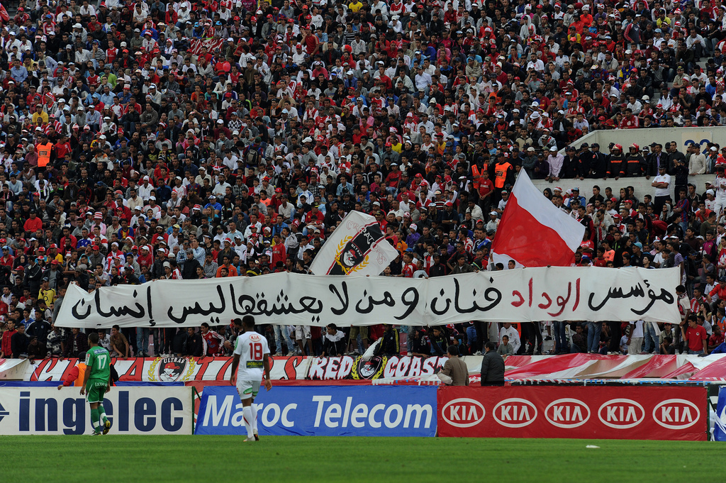 Supporter du Wydad